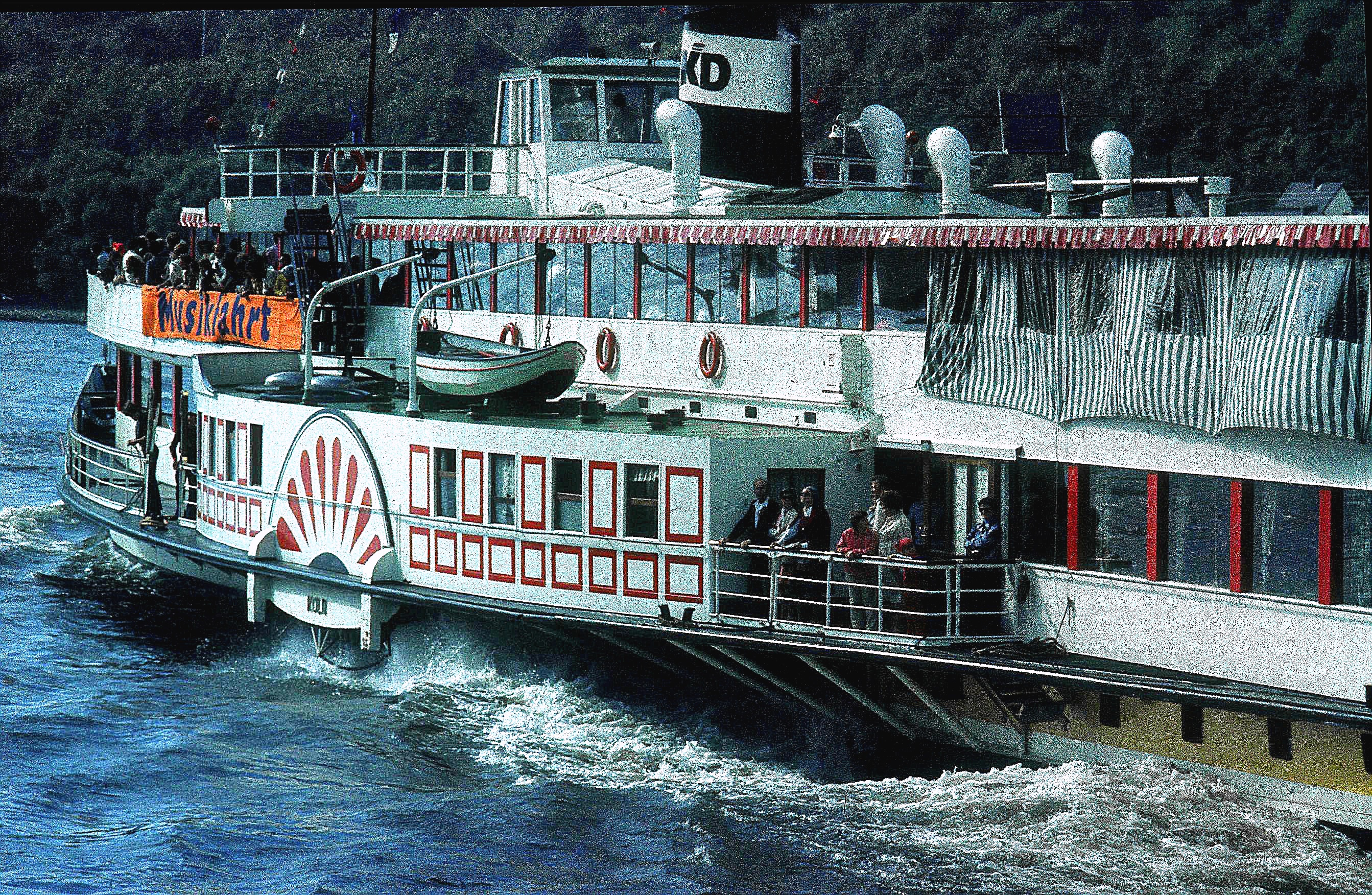 Raddampfer "Goethe" der Köln-Düsseldorfer